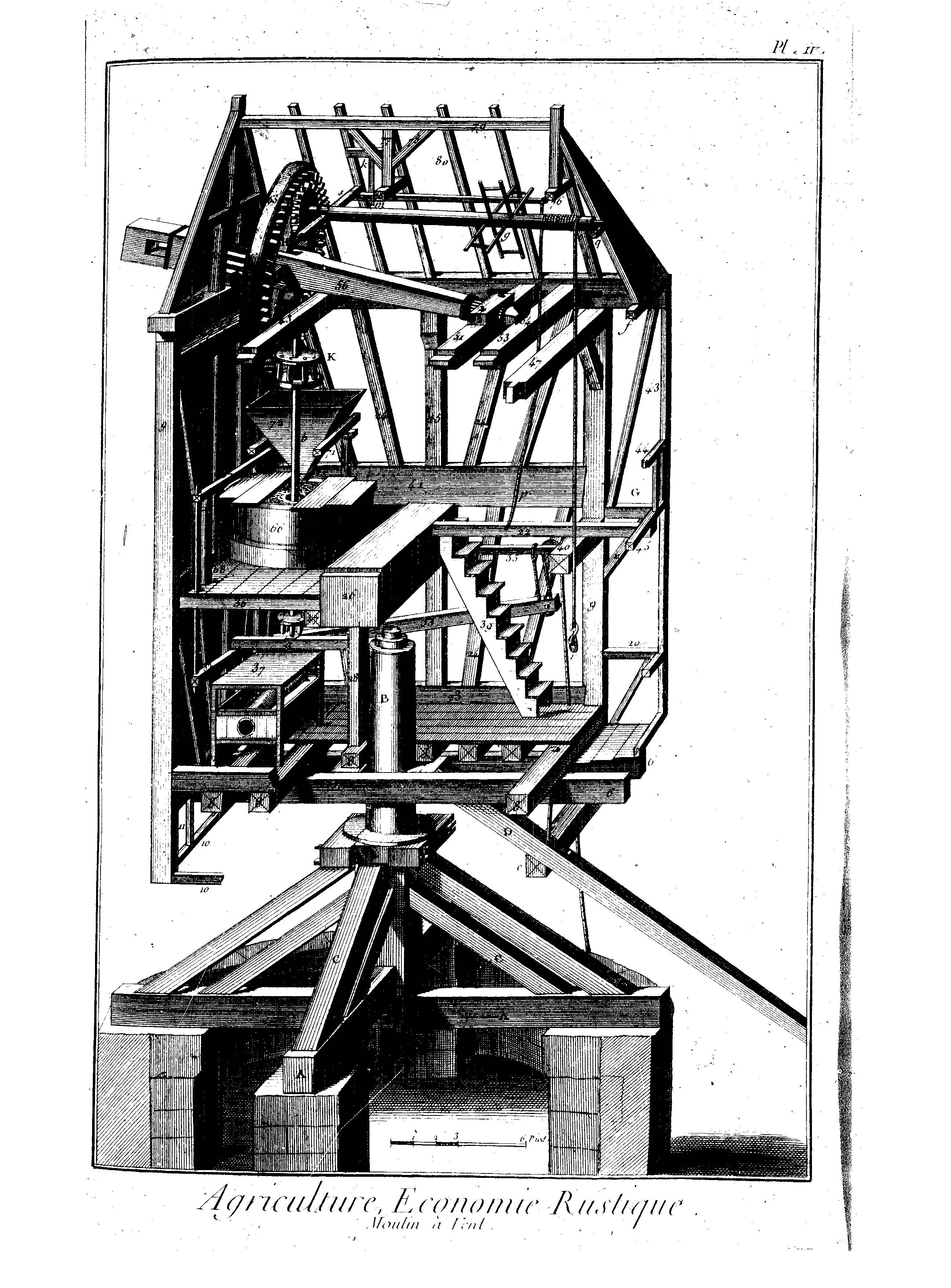 Planches de l'Encyclopédie de Diderot et d'Alembert, volume 1.